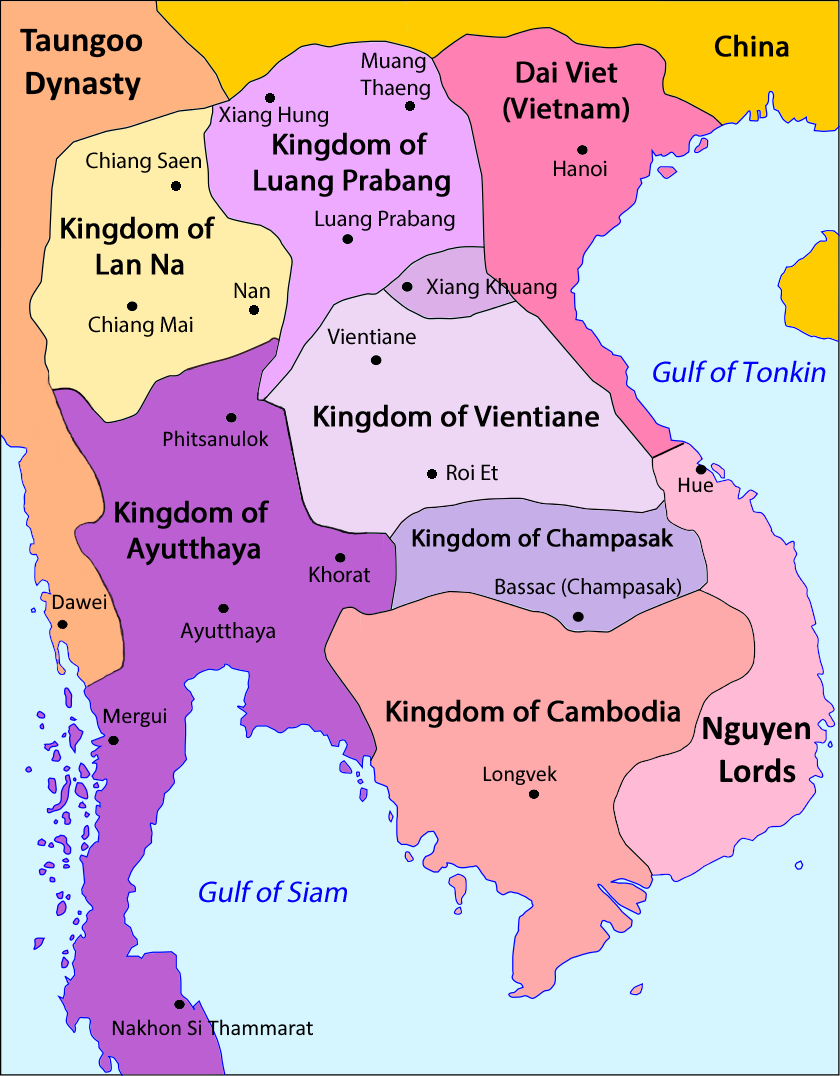 Division territòriala d'Indochina vèrs 1750.